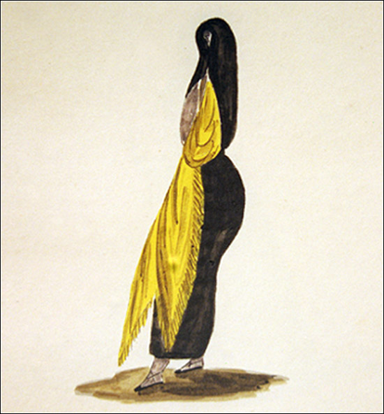 Tapada limeña, según acuarela de Pancho Fierro (s. XIX)